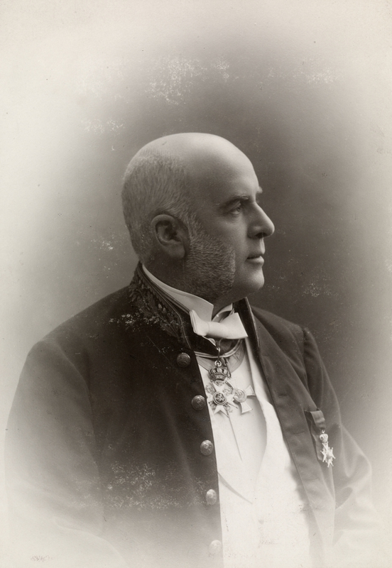 Portrett av Nils Otto Hesselberg, mann, politimester, statssekretær, brystbilde, profil, ordener.